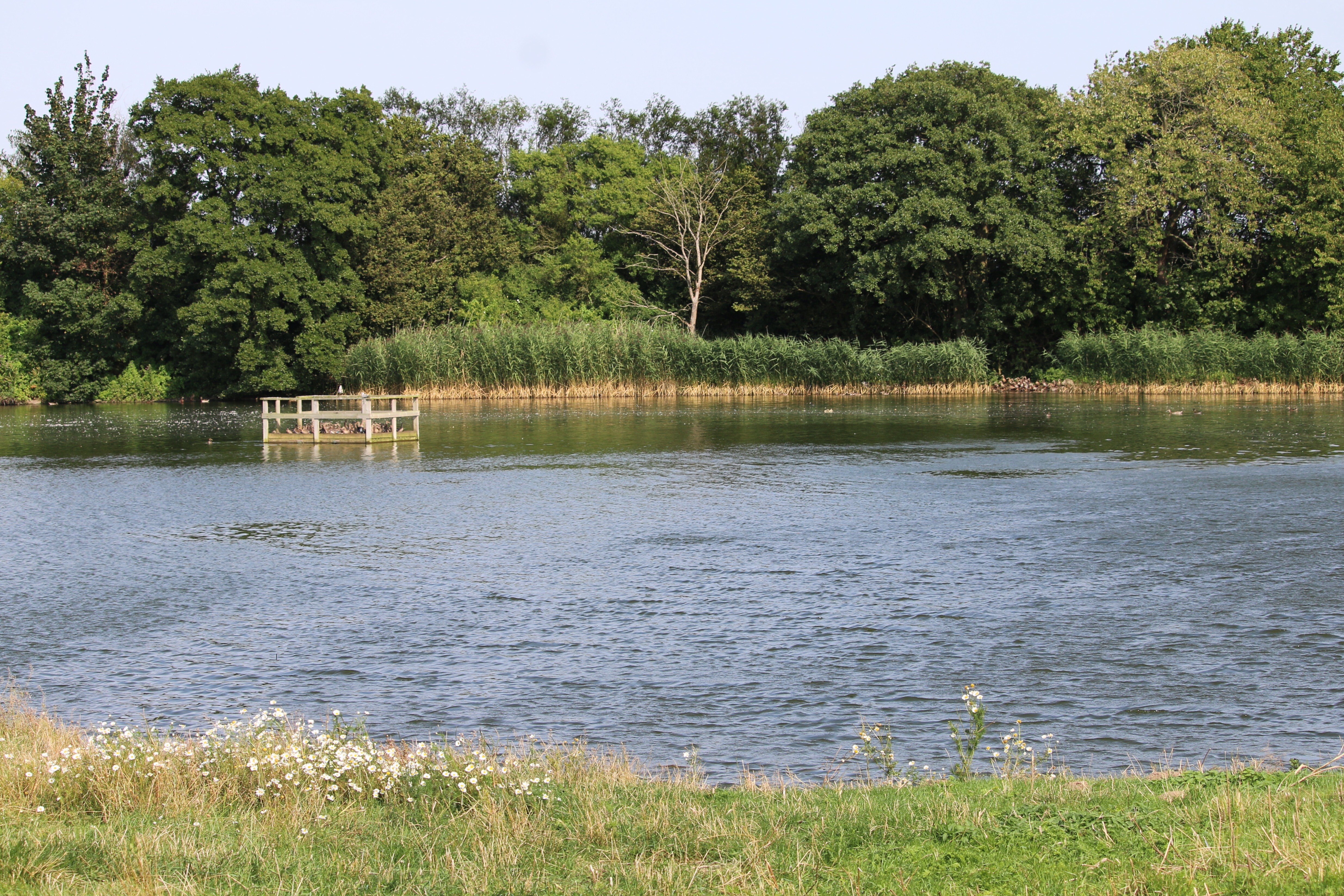 Skönadalsdammen, Ystads kommun